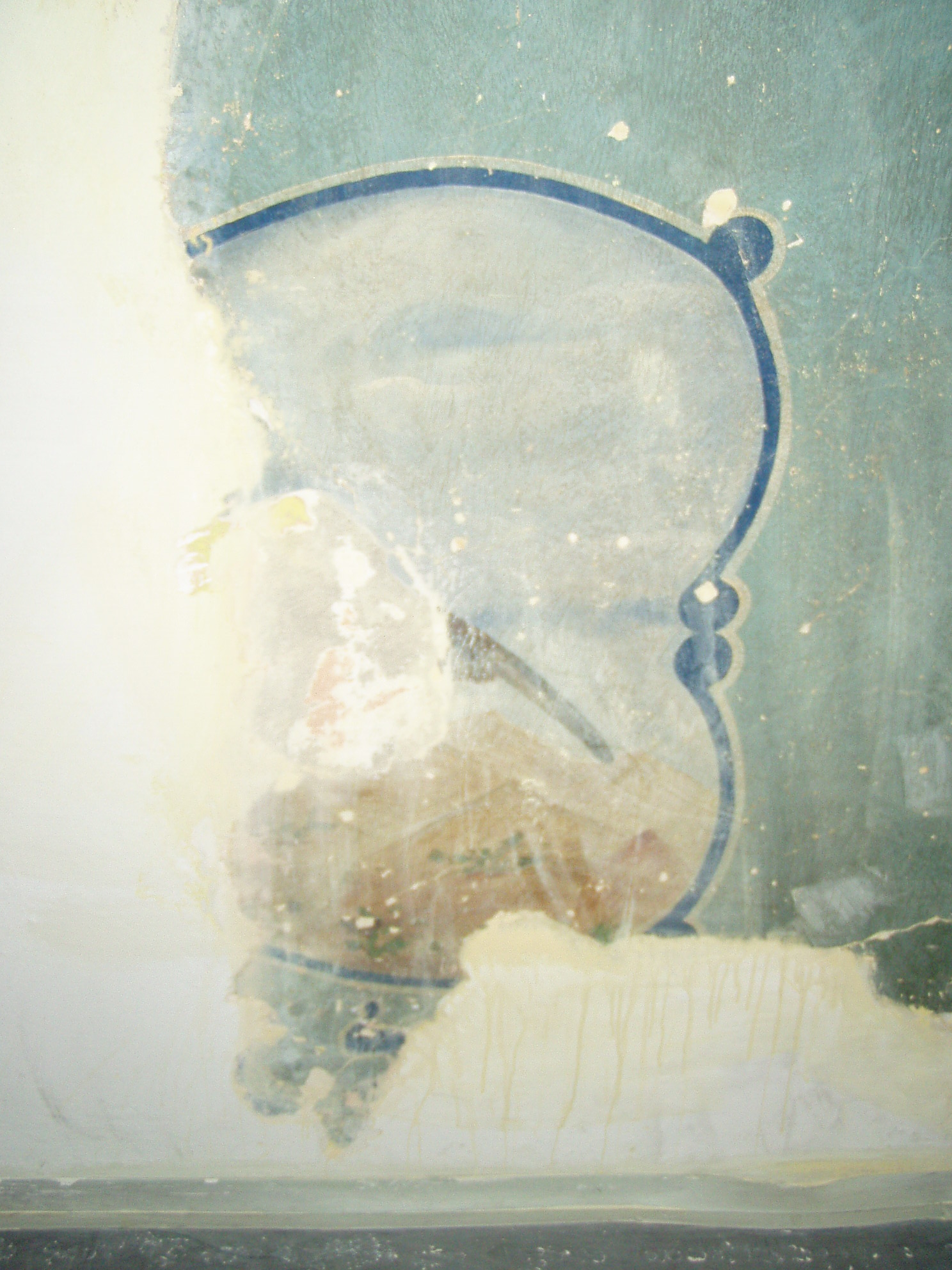 Wnetrze synagogi Chewra Thilim w Krakowie